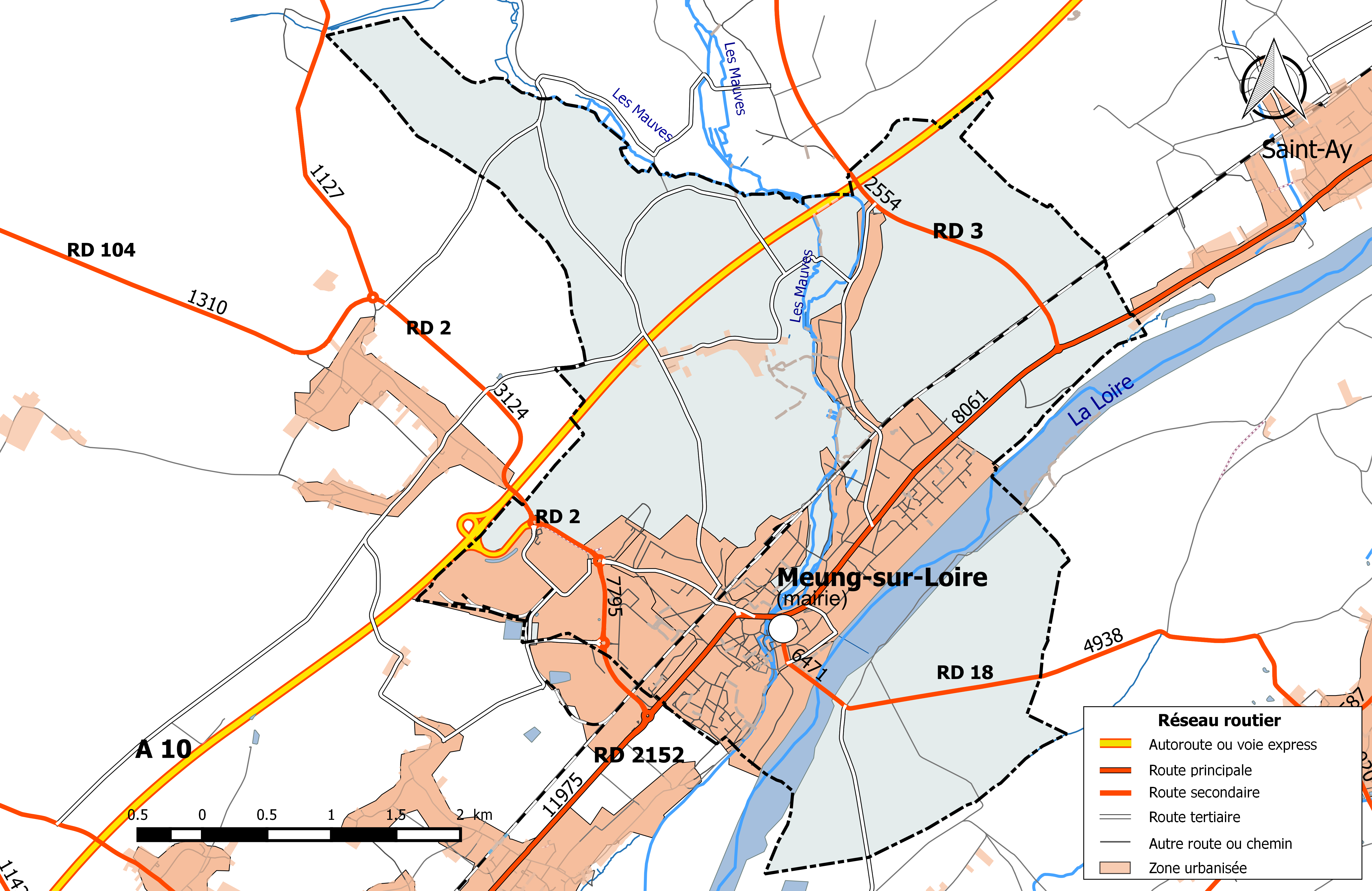 Carte du réseau routier de la commune de Meung-sur-Loire.